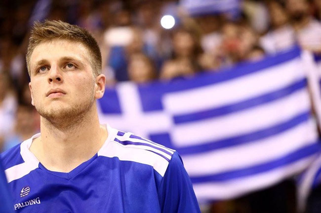 Ο Βασίλης Χαραλαμπόπουλος με την Εθνική U18 το καλοκαίρι του 2015.